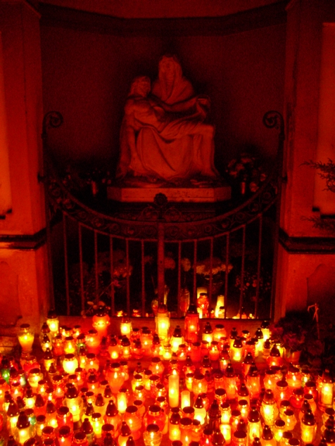 Stacja drogi krzyżowej na cmentarzu w Lidzbarku Warmińskim - pieta, rzeźba prawdopodobnie Michaela Lipowa